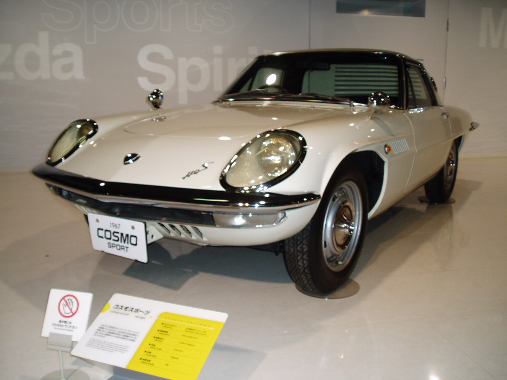 初代・コスモスポーツ。マツダミュージアム。広島県広島市